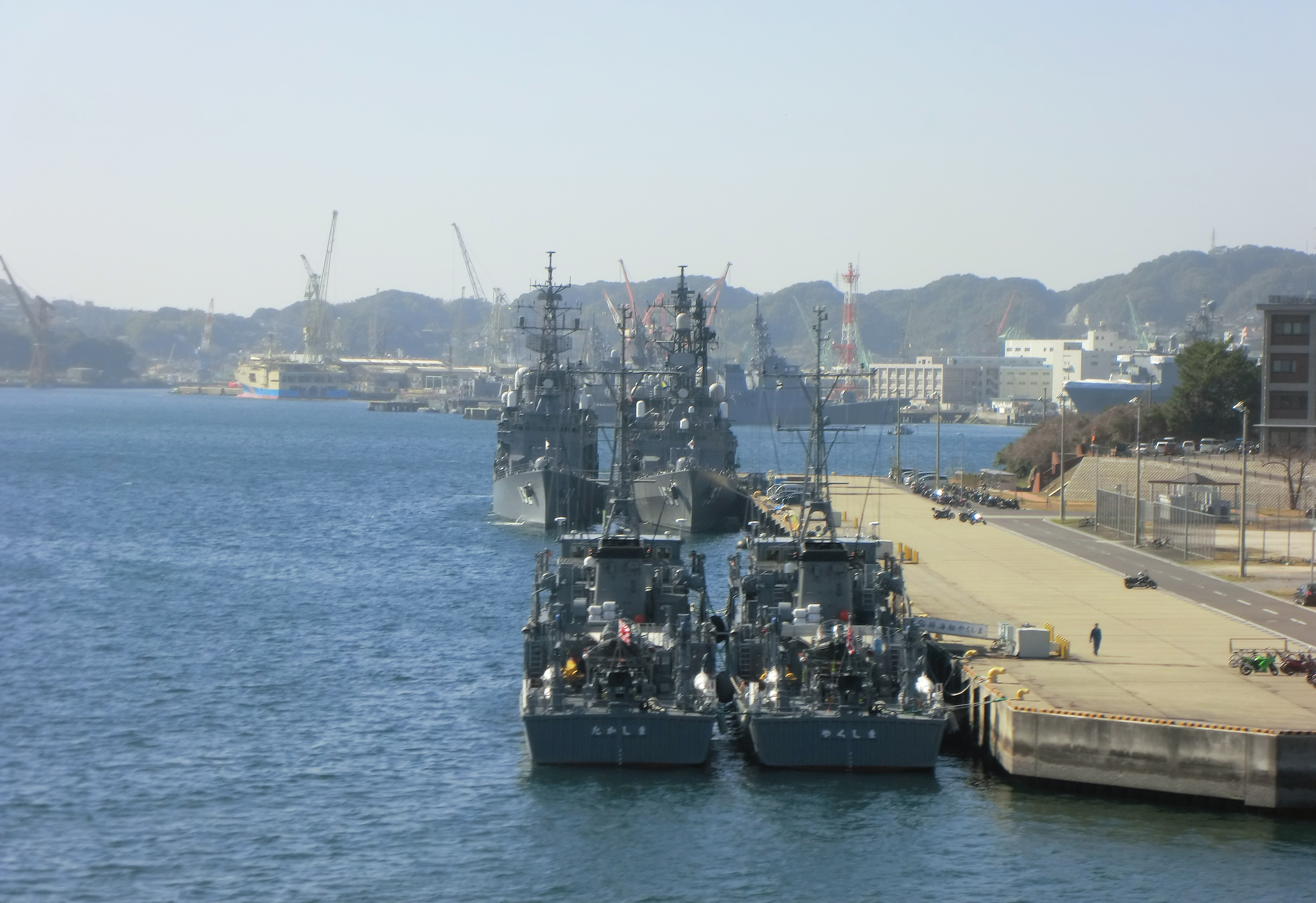 佐世保・倉島岸壁に係留中の掃海艇たかしま・やくしま 〔手前〕。後列は護衛艦あさゆき・さわぎり。遠くの立神桟橋には護衛艦ちょうかい。